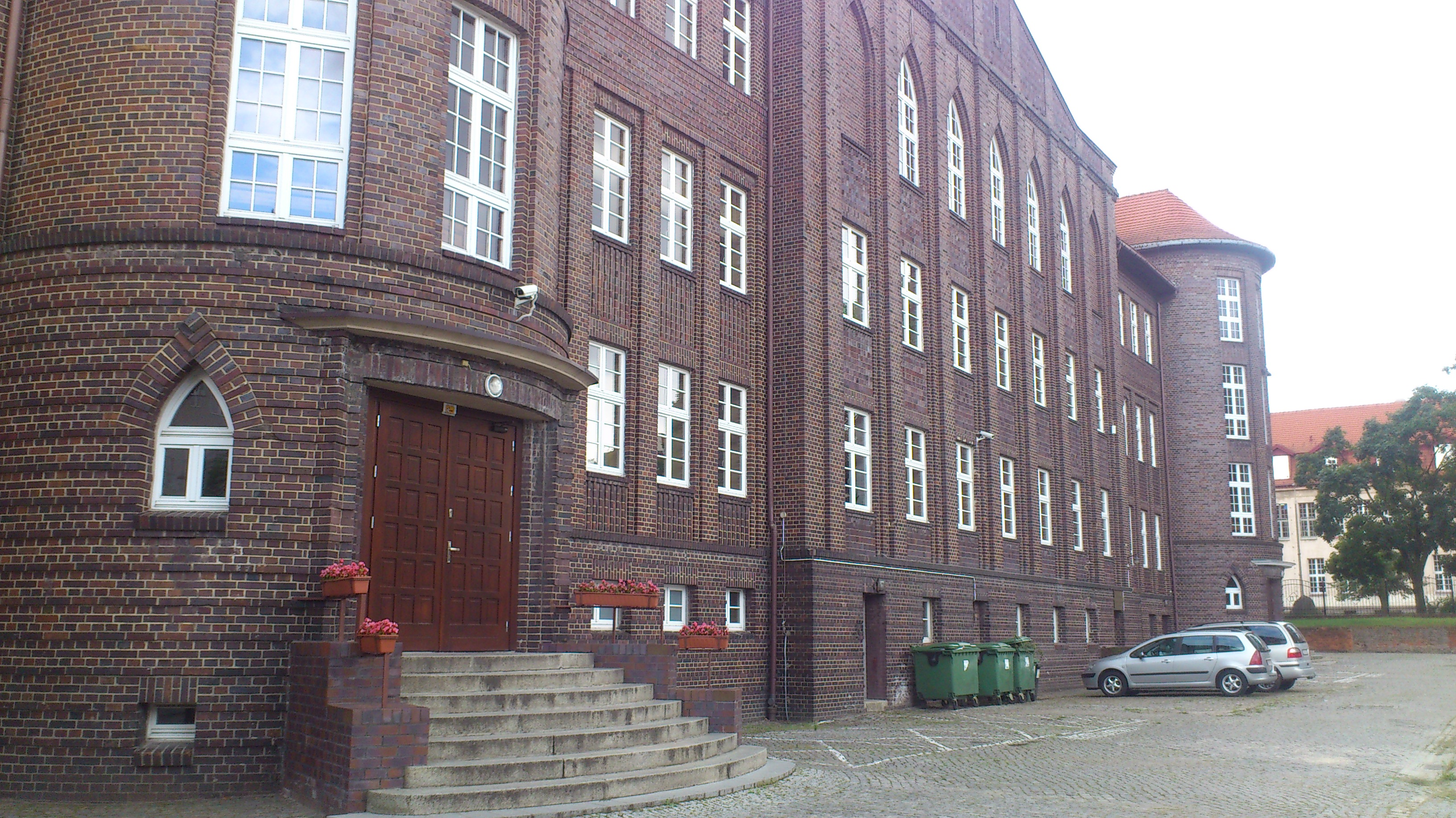 Glogow, Poland